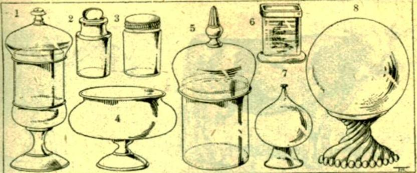 Différents bocaux de verre en usage en 1922.